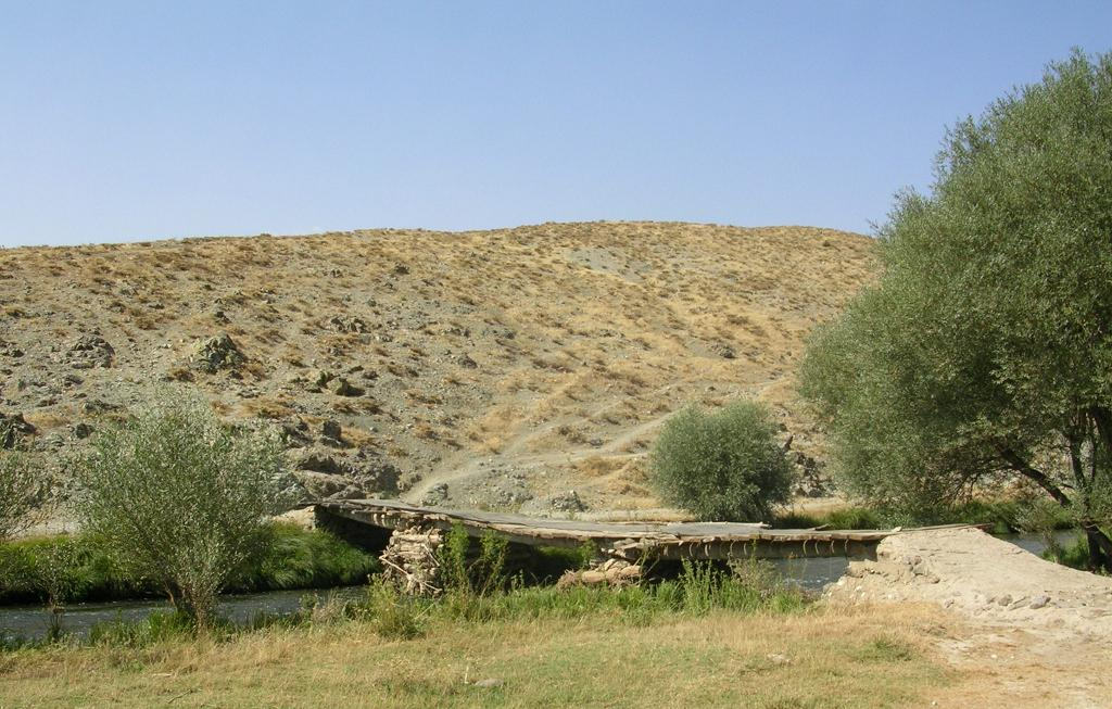 yazar: Şamil Korkmaz tanım: Aşağı köprü (kuzey-doğu)